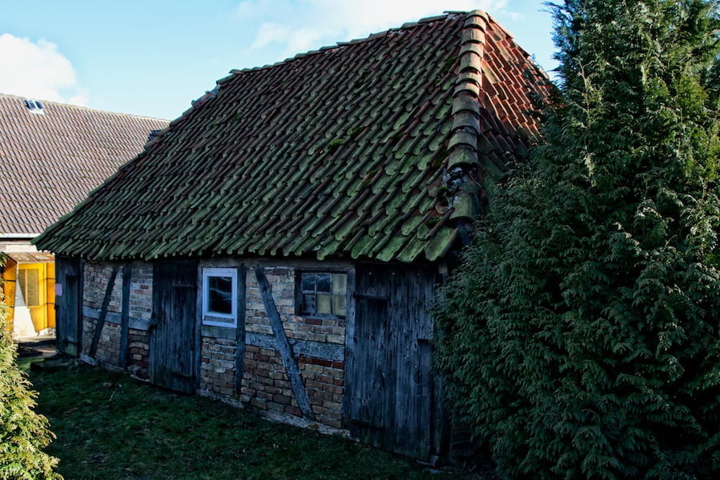 Grundshagen, Stall an der Bushaltestelle. Denkmalschutzliste MV